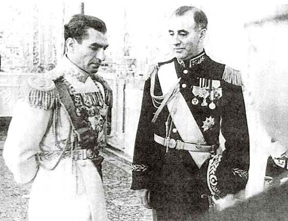 Le Shah Mohammad Reza Pahlavi et Fazlollah Zahédi